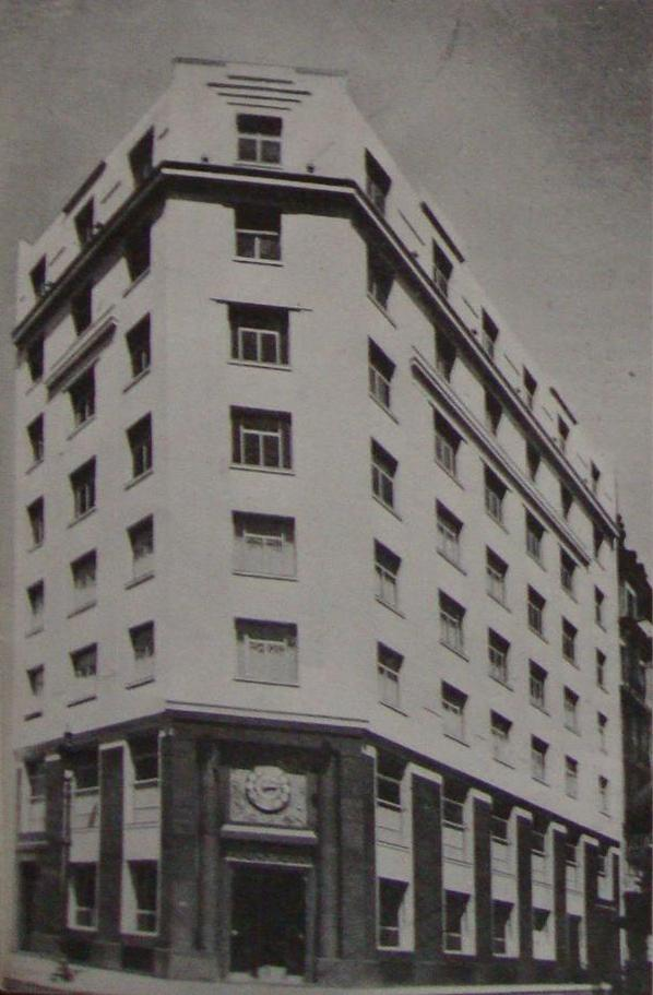 Vista del Edificio Transradio Internacional, proyecto de Alejandro Christophersen para la Compañía Compañía Argentina de Telecomunicaciones. Avenida Corrientes y San Martín.